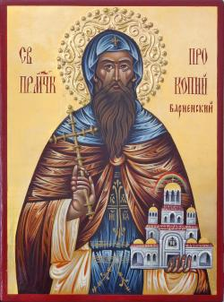 Свети преподобномъченик Прокопий Варненски. Иконата е разработена от екип на Зографско ателие „Свети Иван Рилски“ – София, през 2010 г.